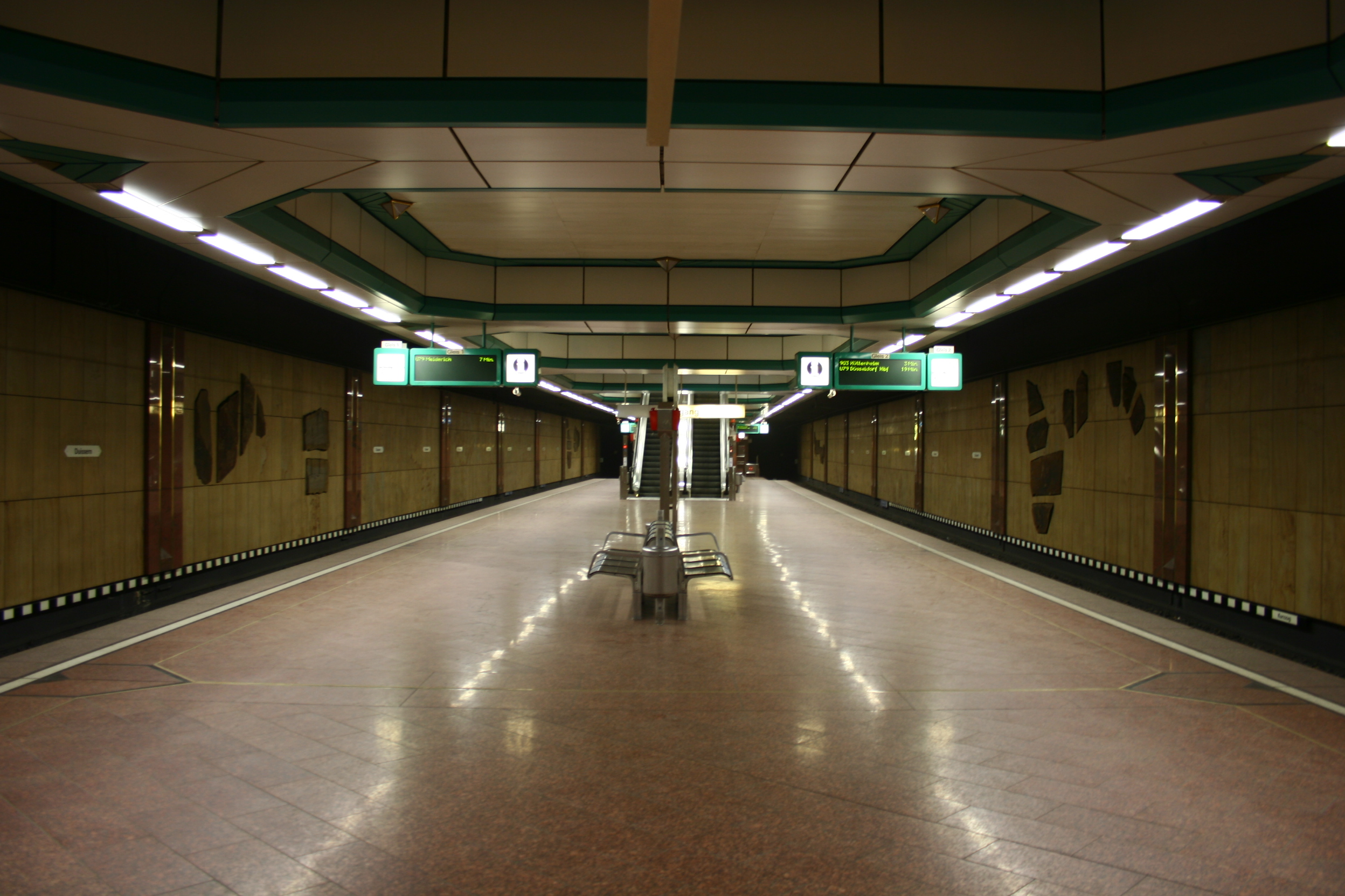 U-Bahnhof Duissern der Stadtbahn Duisburg